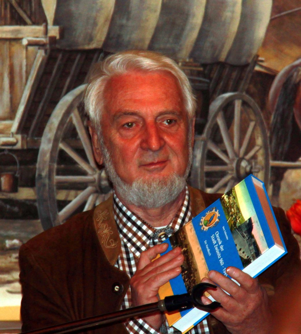 Uwe Schneider, ehemaliger Bürgermeister und Ehrenbürger unserer erzgebirgischen Bergstadt Zwönitz bei der Buchvorstellung seiner Chronik im Hotel Roß (ältestes Gasthaus Sachsens)